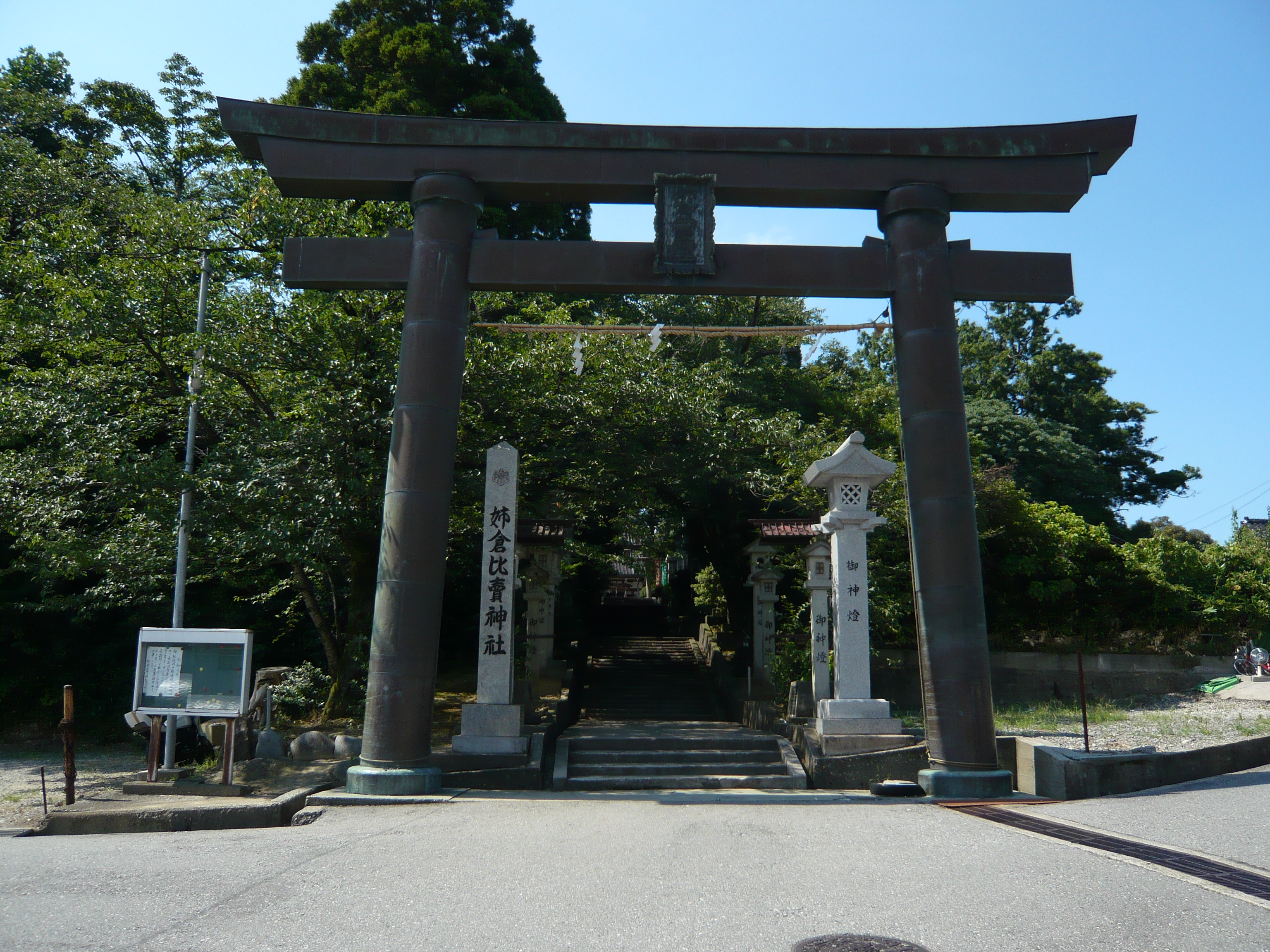 Anekurahime-jinja, Toyama, Toyama, Japan 姉倉比売神社（富山県富山市呉羽町）入口